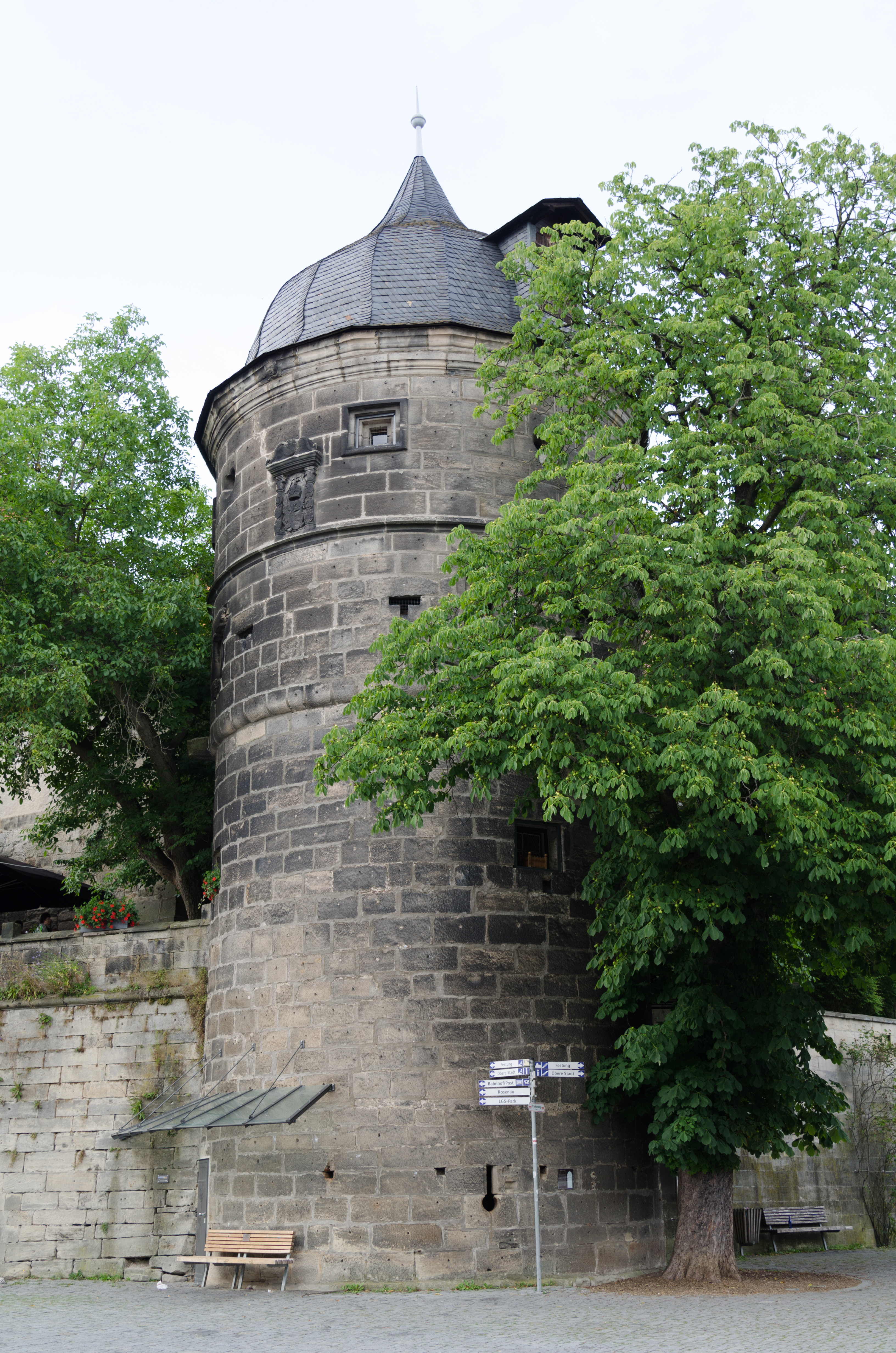 Kronach, Stadtbefestigung, Pfarrturm